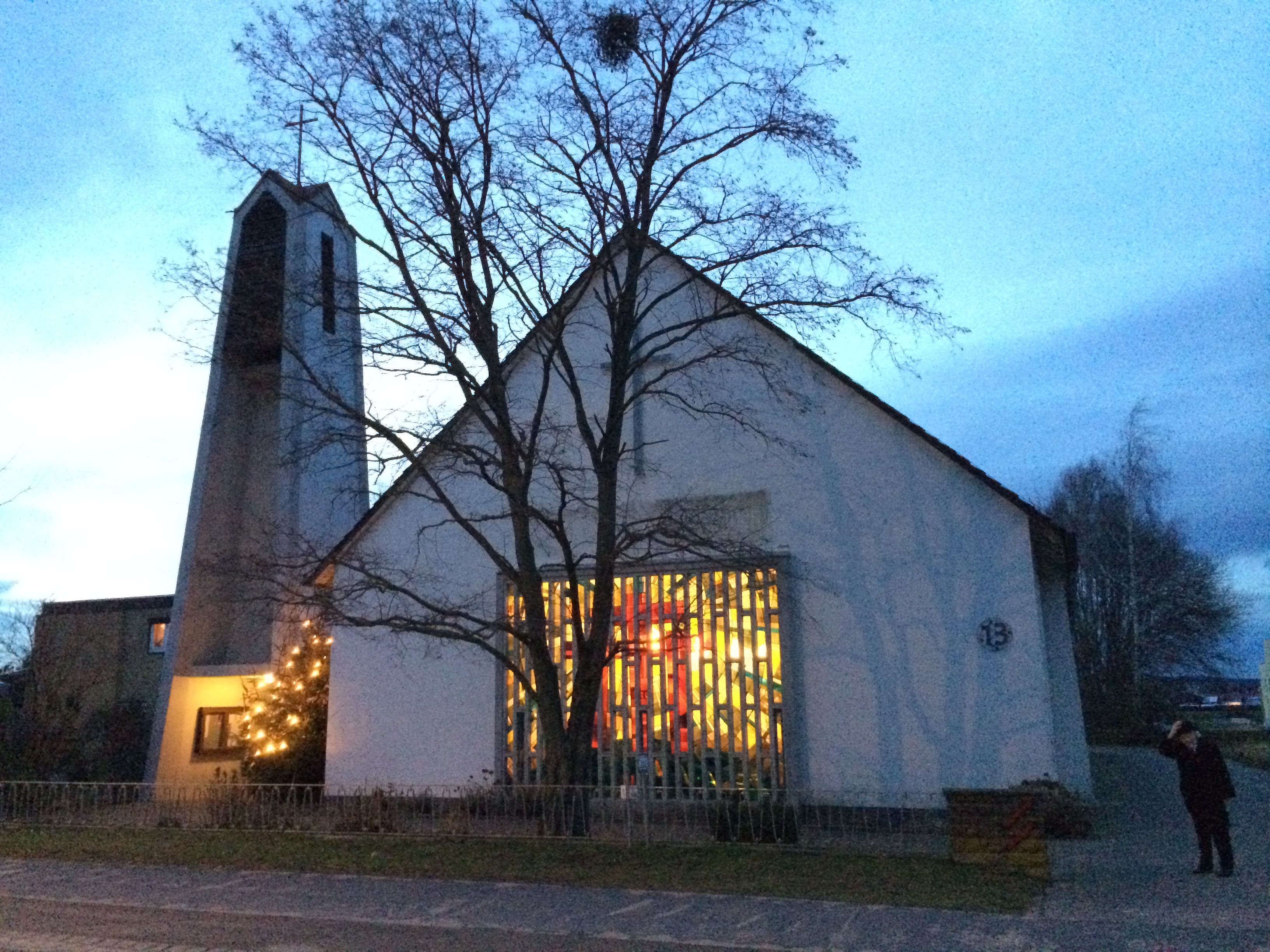 Katholische St.-Christophorus-Kirche in Holtensen (Gemeinde Wennigsen). Heiligabend, 24.12.2013. / Catholic St. Christophorus Church in Holtensen, Wennigsen, Lower Saxony, Germany at Holy Night 12/24/2013.